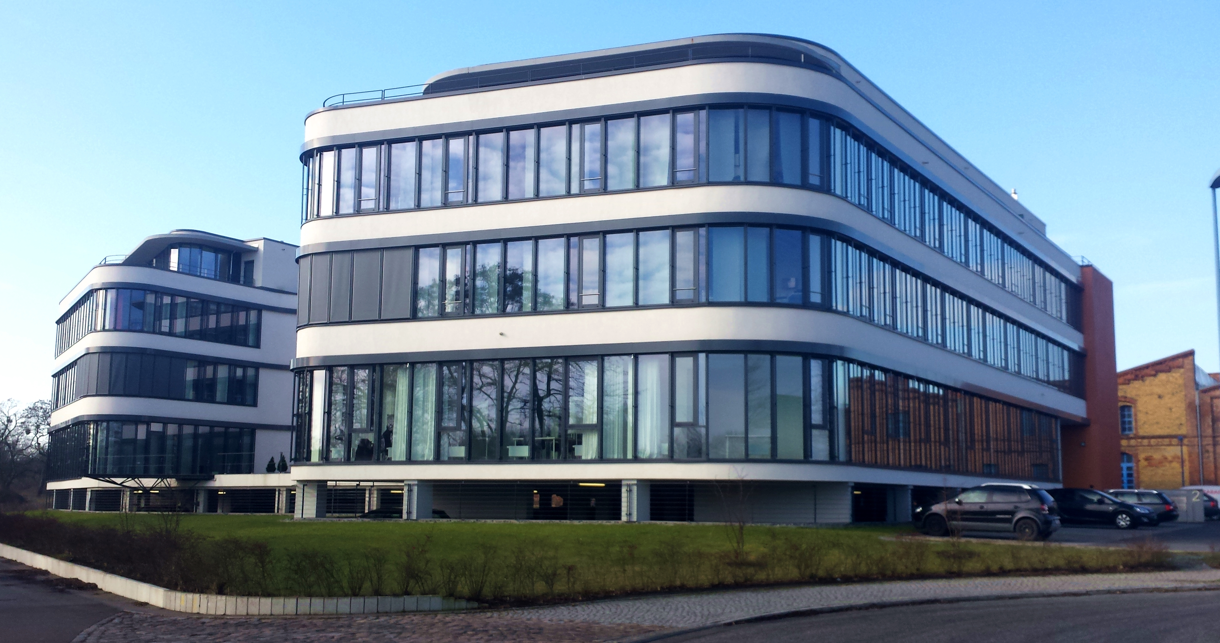 Büro- und Forschungsgebäude "Elbe-Office" am Wissenschaftshafen in Magdeburg